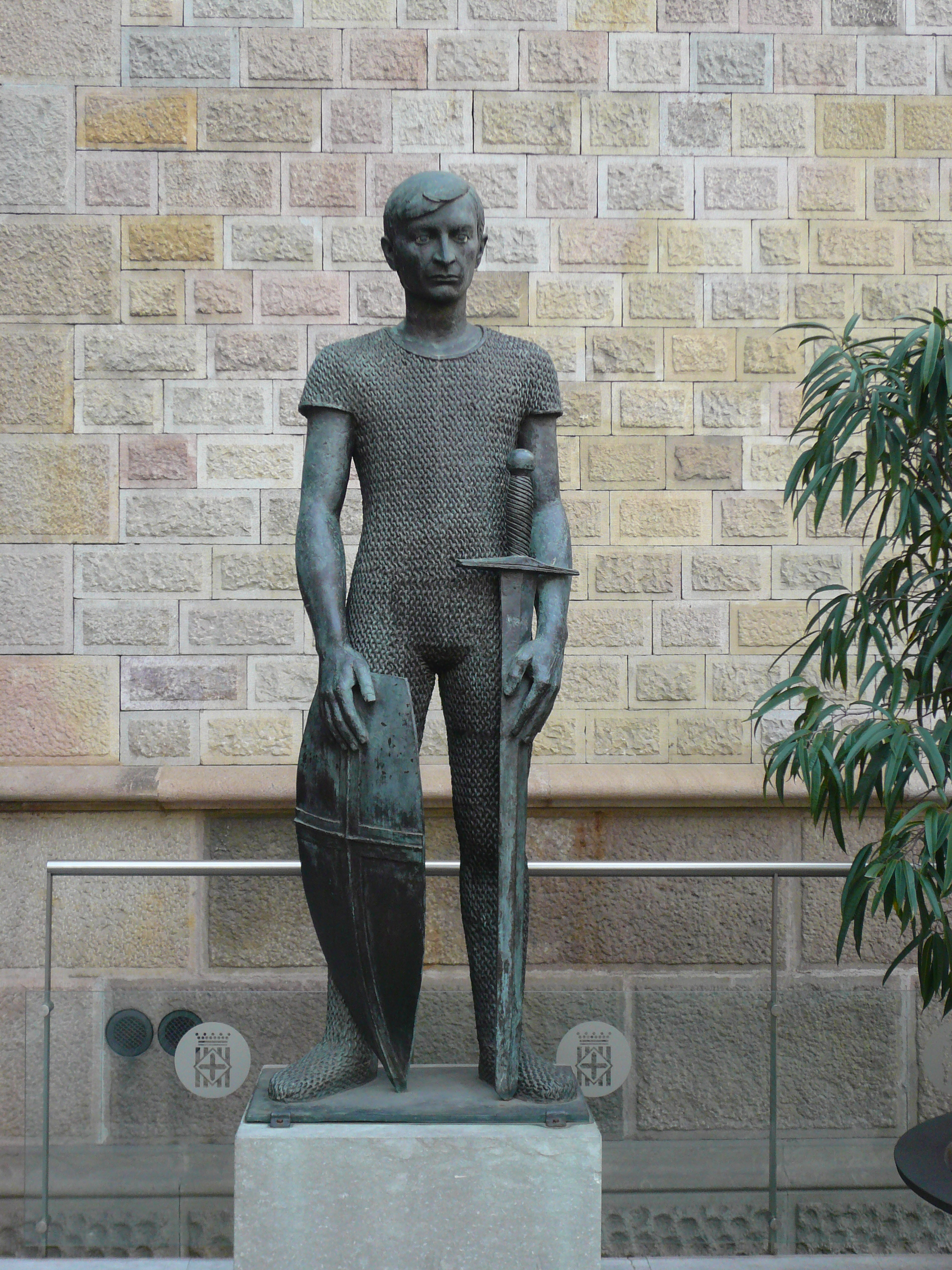 Sant Jordi. Rambla Catalunya amb av. Diagonal (Barcelona). Escultor: Joan Rebull, signada. Material: bronze. Obra de 1977, col·locada en aquest emplaçament 1987. 81″ N, 2° 09′ 26.89″ E